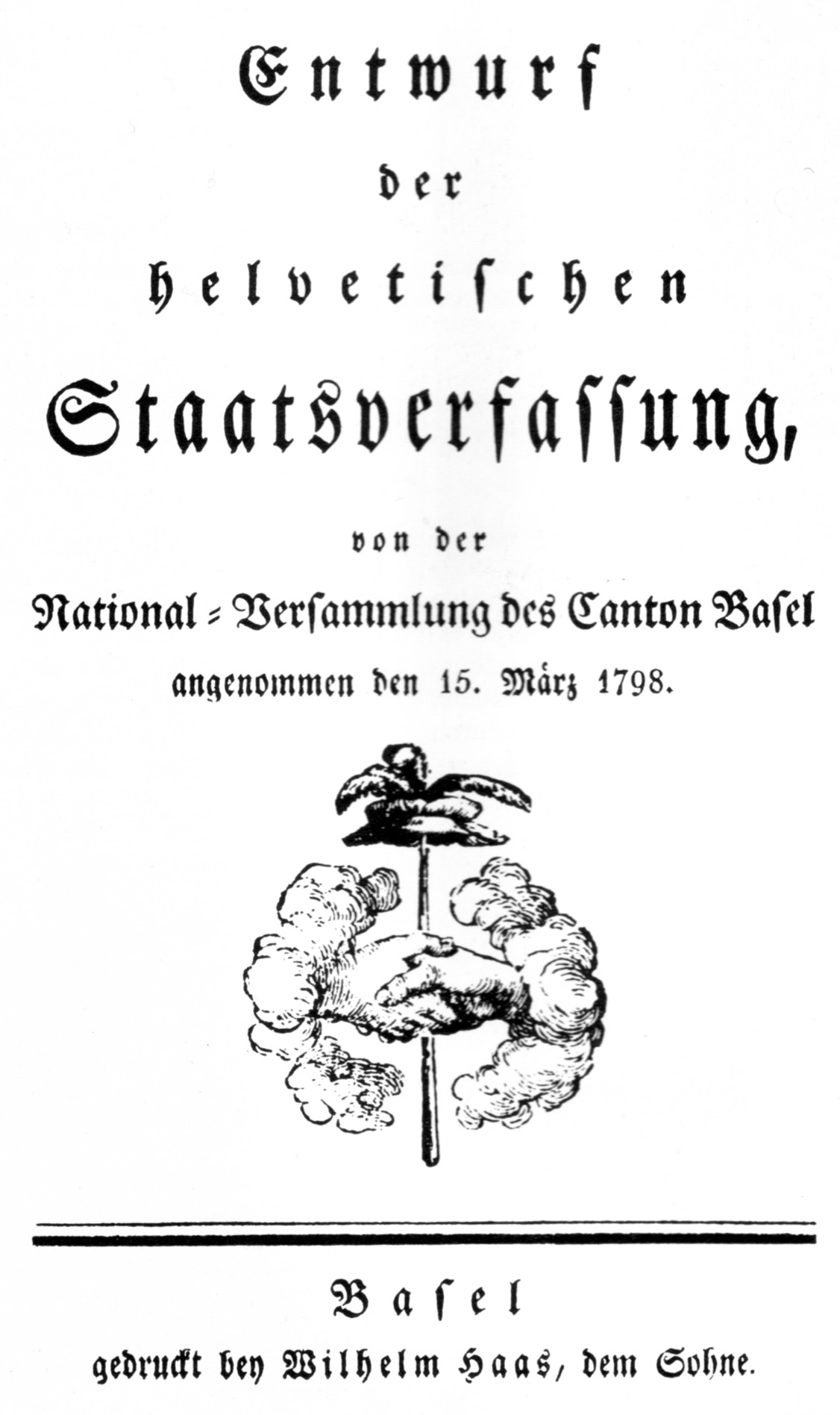 Titelblatt zum "Entwurf der helvetischen Staatsverfassung", 15. März 1798. (Genauer Titel: Entwurf der helvetischen Staatsverfassung, von der National-Versammlung des Canton Basel angenommen den 15. März 1798. Basel, gedruckt bey Wilhelm Haas, dem Sohne).